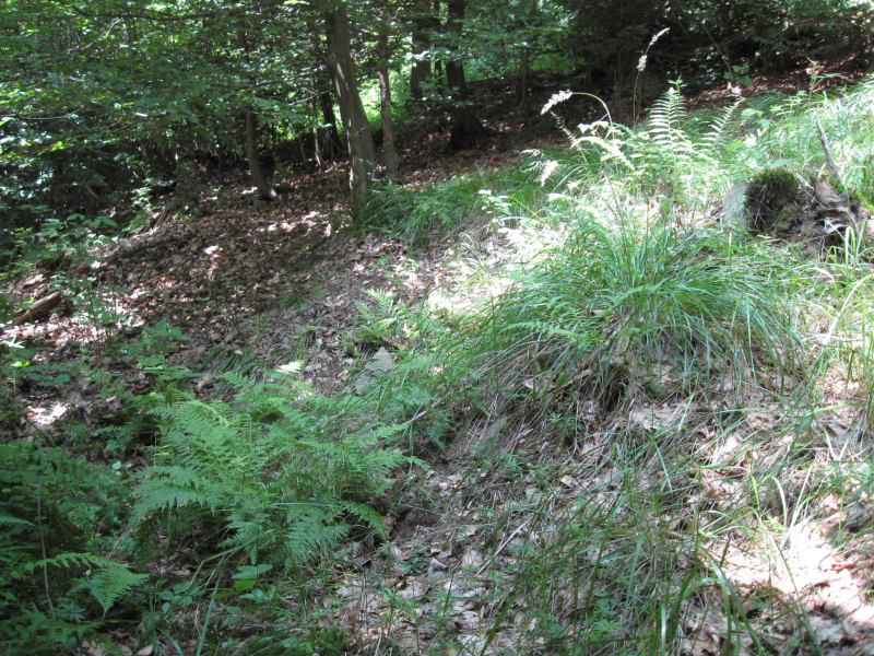 Hamlíkov - relikty zaniklé osady